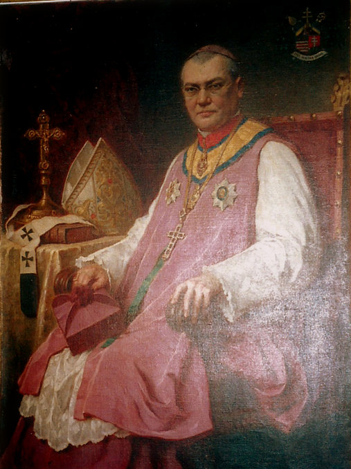 Várady Lipót Árpád római katolikus püspök, kalocsai érsek, teológiai doktor, egyházi író.